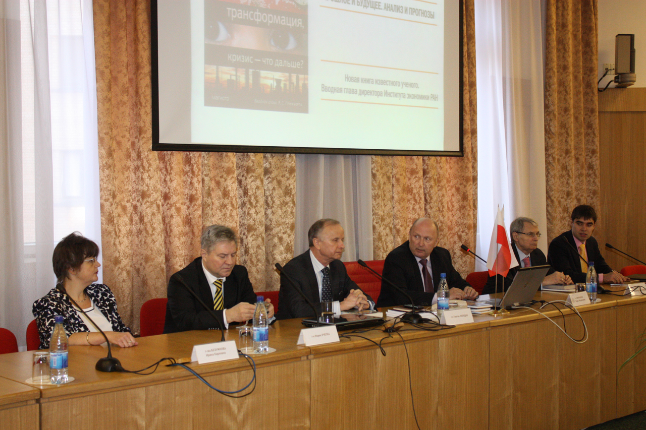 Презентация новой книги Колодко